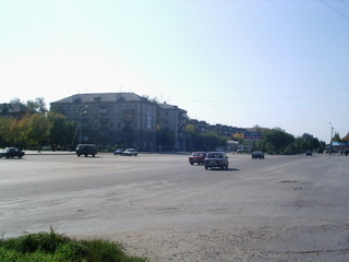 Центральная площадь им.Здобнова, расположена на центральной ул. Свердлова (проспект), г. Шадринск, Курганская обл., Россия (The central area of name Zdobnov, is located on central by Sverdlov street (prospectus), Shadrinsk, Kurgan region, Russia) Автор/Autor - Сычугов М.В./ Sychugov M.V. Время создания/Data-Time - 16 сентября/september, 2005, 14:49 Фотоаппарат/Camera - Mustek DC 4000